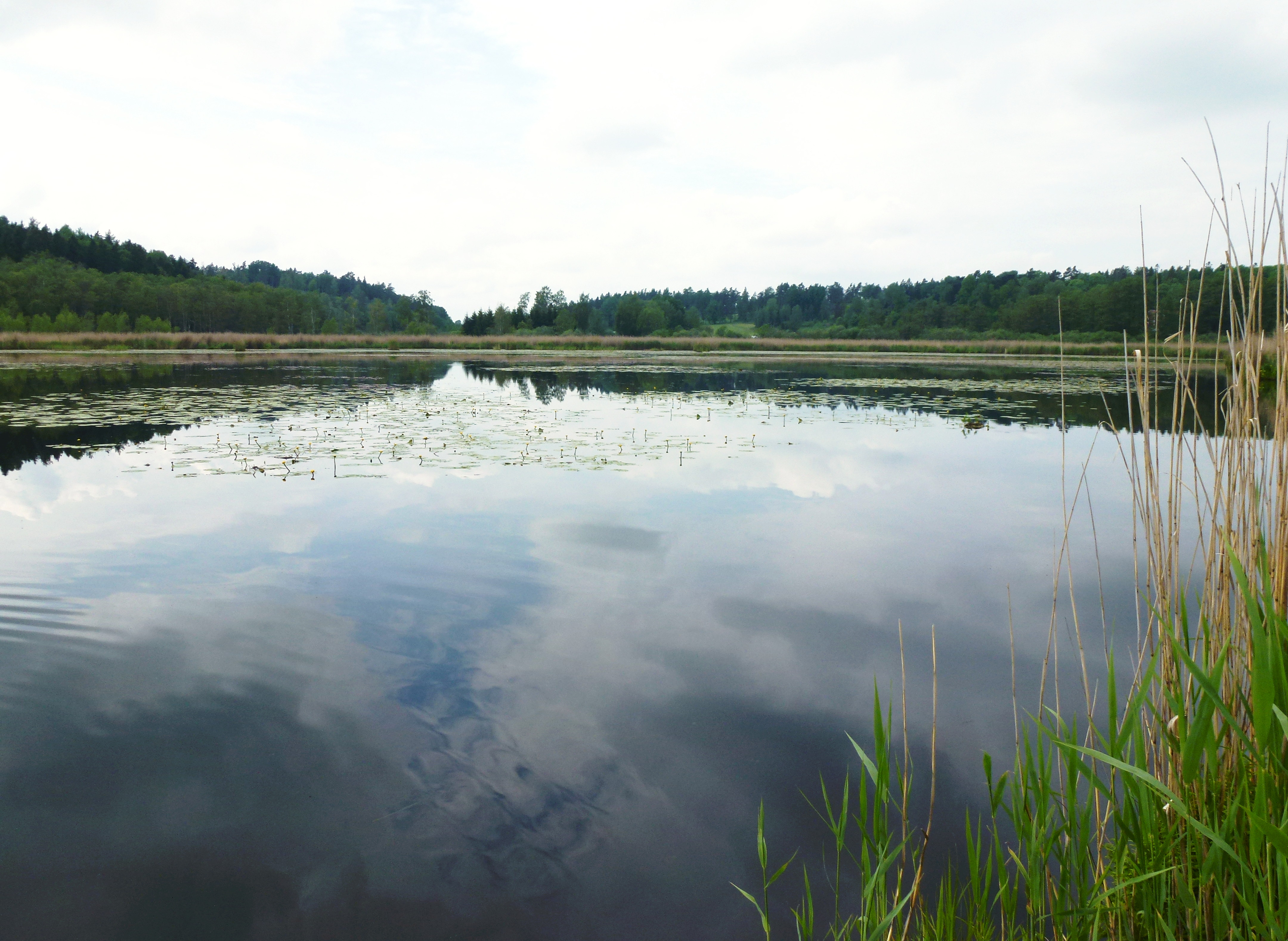 Sjön Somran